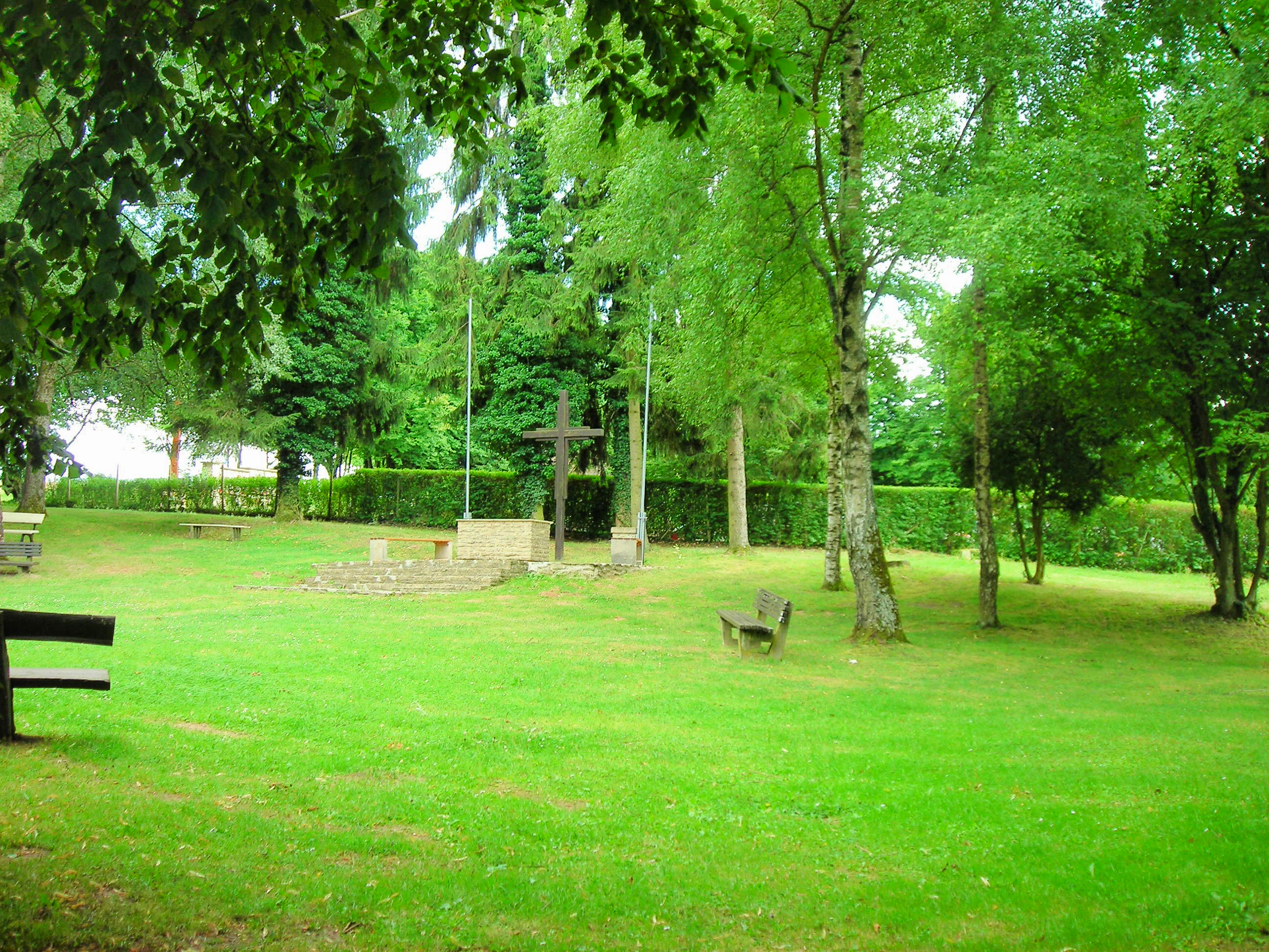 Autel champêtre en face de la chapelle Ste Oranne de Berus (Allemagne)